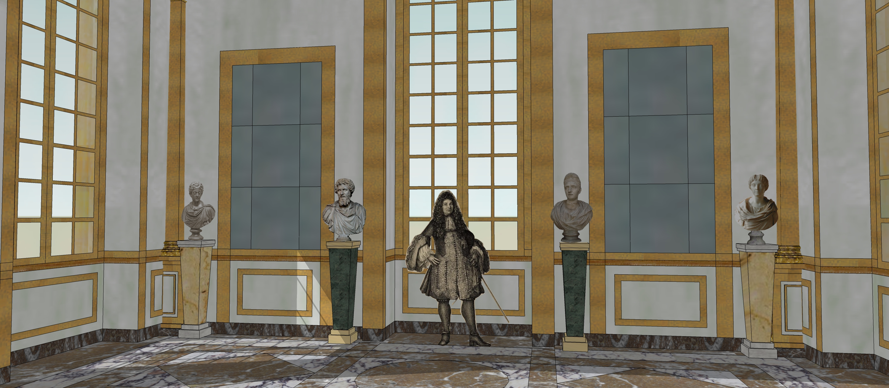 Schéma du salon du milieu de la galerie du château-vieux de Meudon, état sous Louvois, avant création de la tribune de la chapelle, vers 1690.